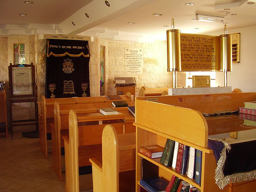 מבט אל תוך בית הכנסת בשבות רחל.